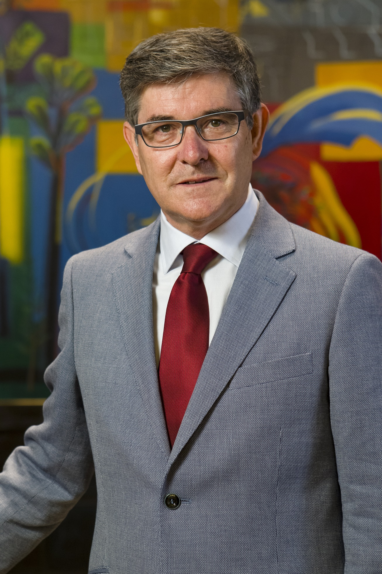 Vicente Guillén